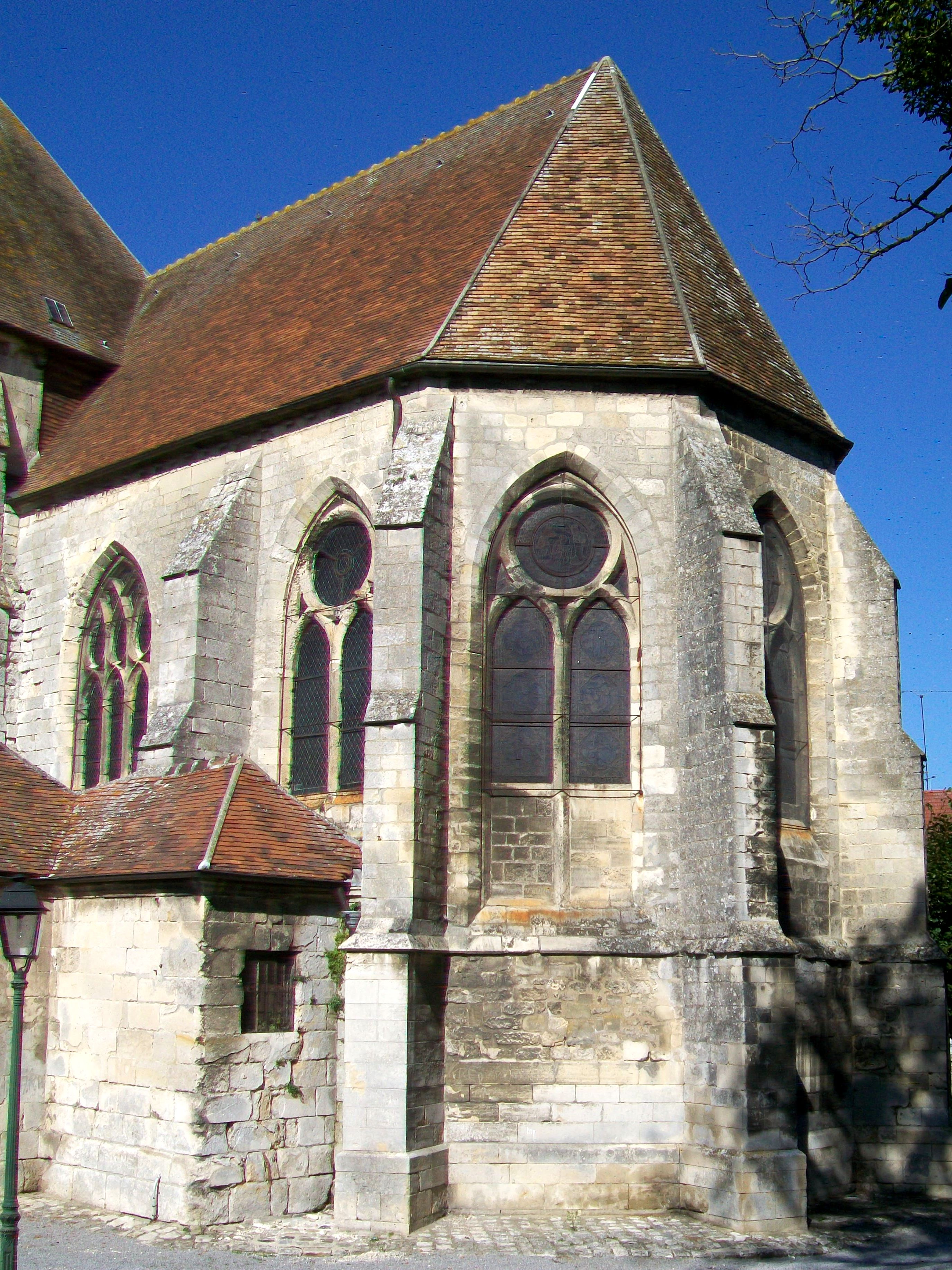 Le chœur du XIIe siècle de l'église Saint-Pierre-et-Saint-Paul, de deux travées et au chevet pentagonal.